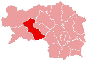 Karte: politischer Bezirk Judenburg Lizenz: GFDL Quelle: Zeichnung plp Datum: de:2004 Ort: Wien